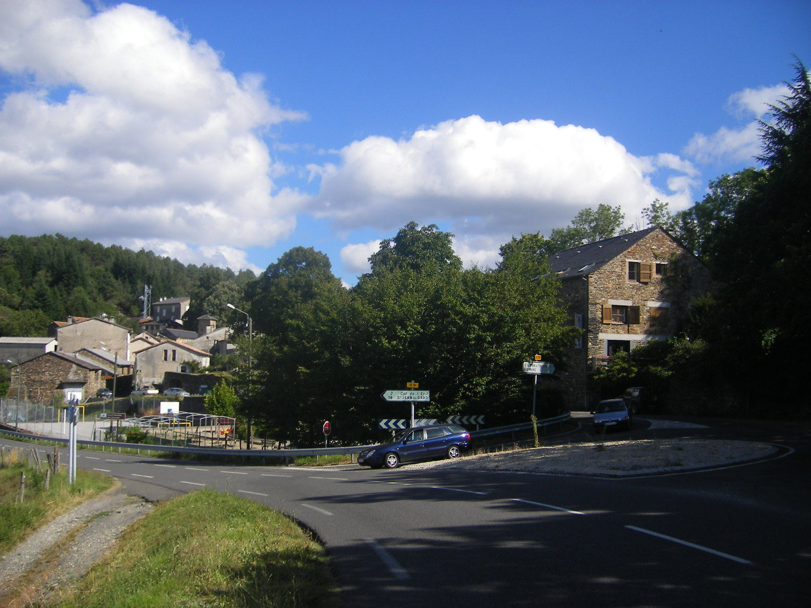 Lozere - Saint-Roman-de-Tousque